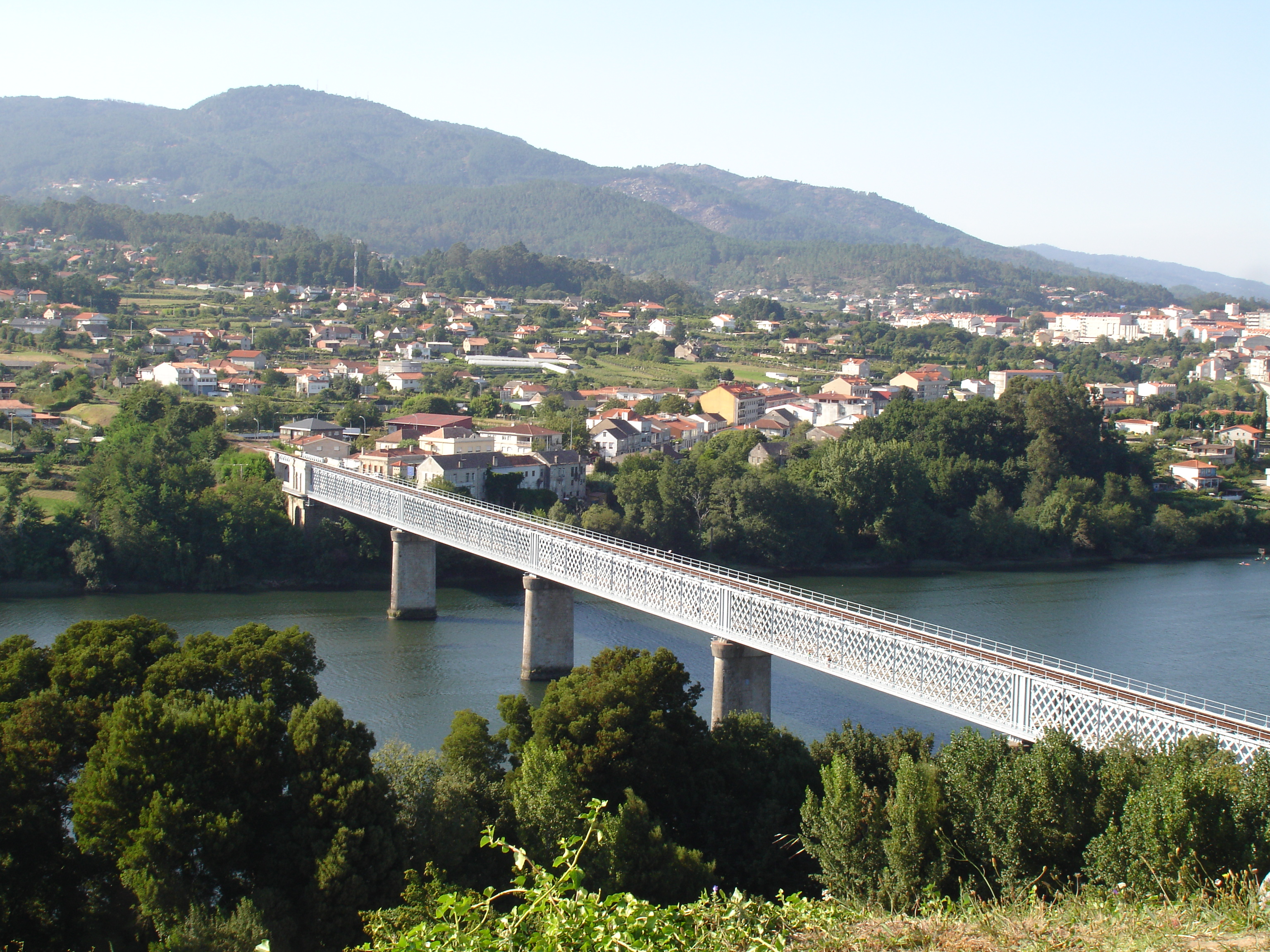 El puente diseñado por un discipulo de Eiffel